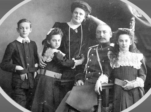 Князь Виктор Сергеевич и Елена Константиновна Кочубей с детьми.